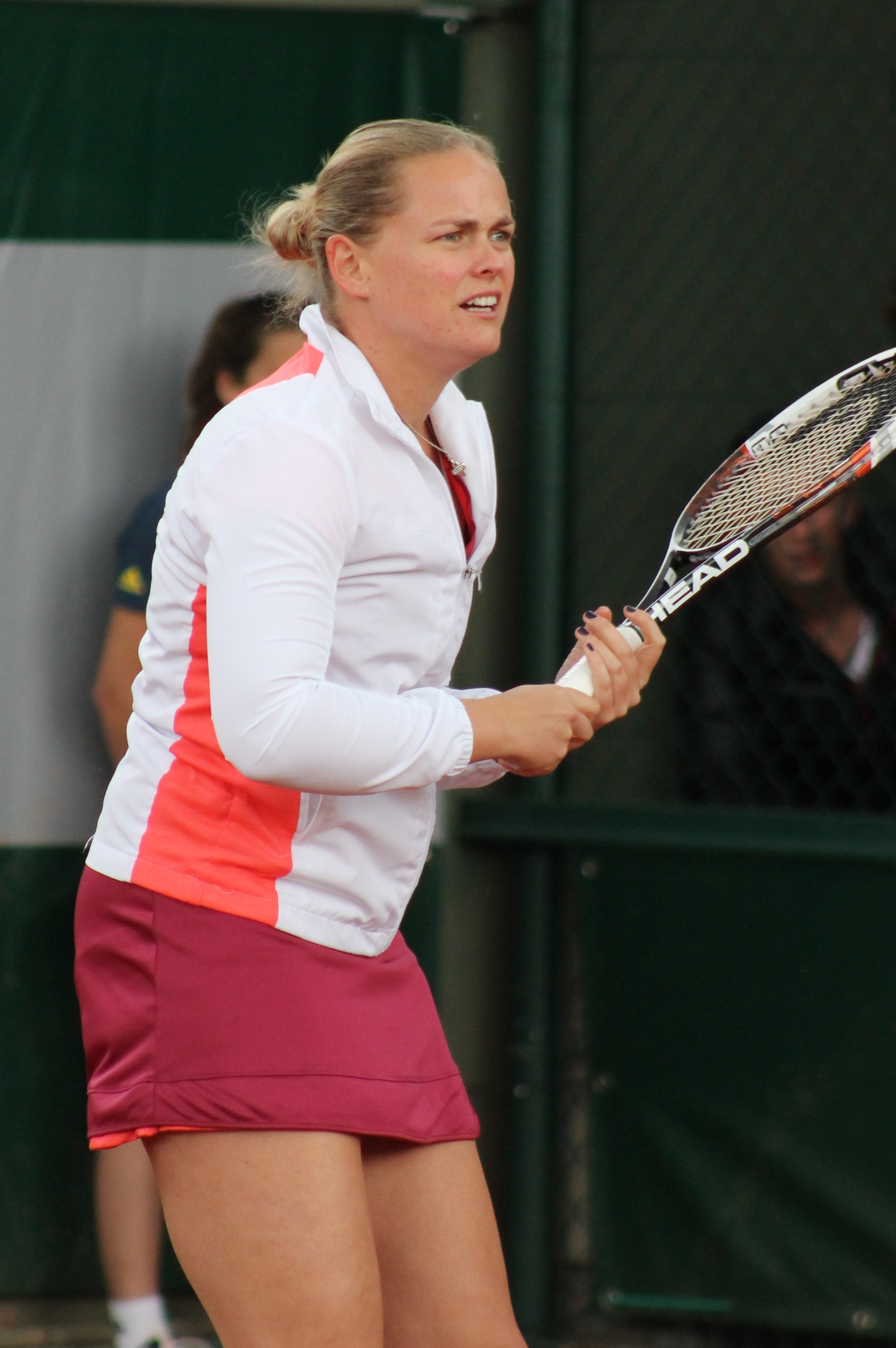 Anna-Lena Grönefeld